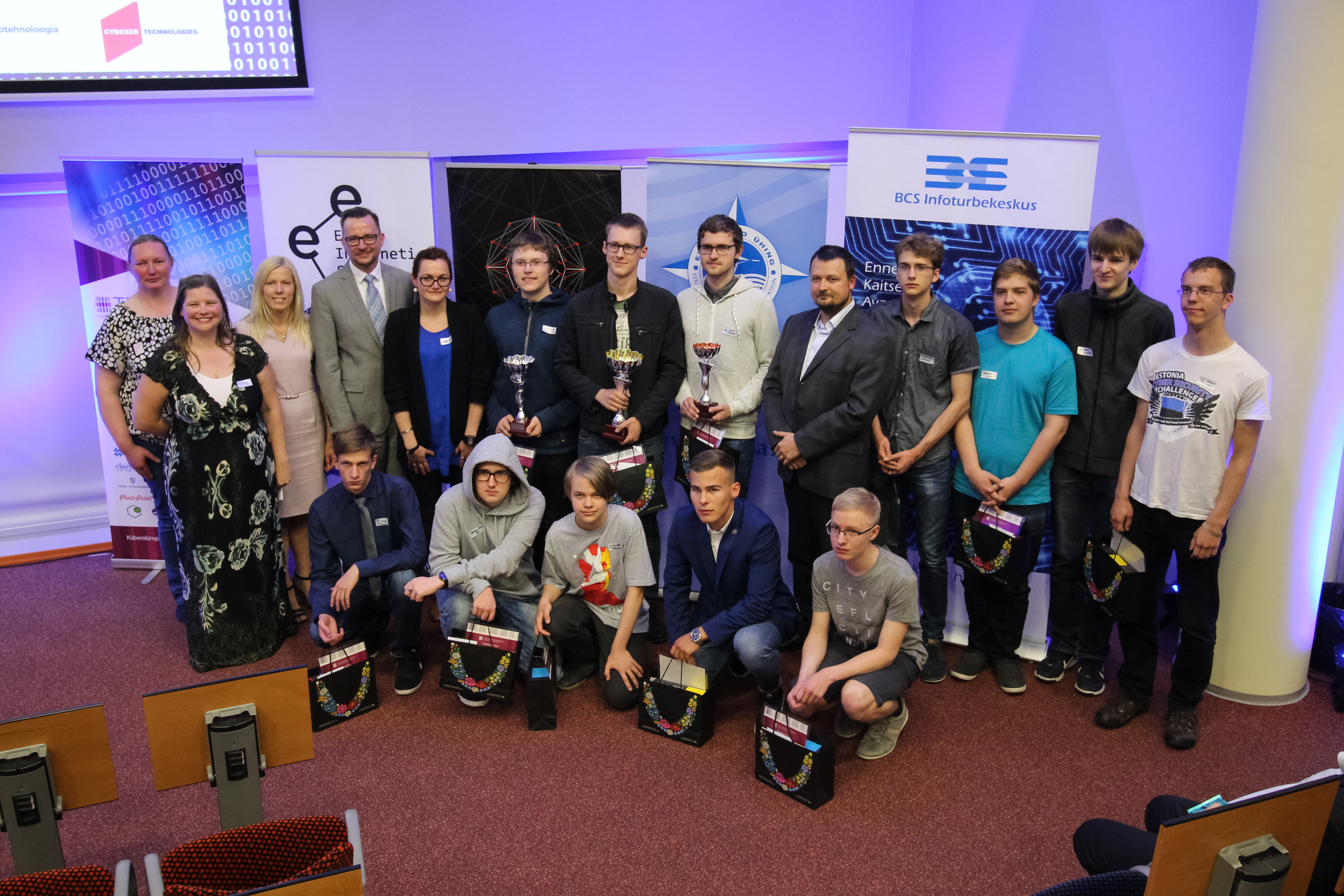 Küberolümpia 2017 esikolmik